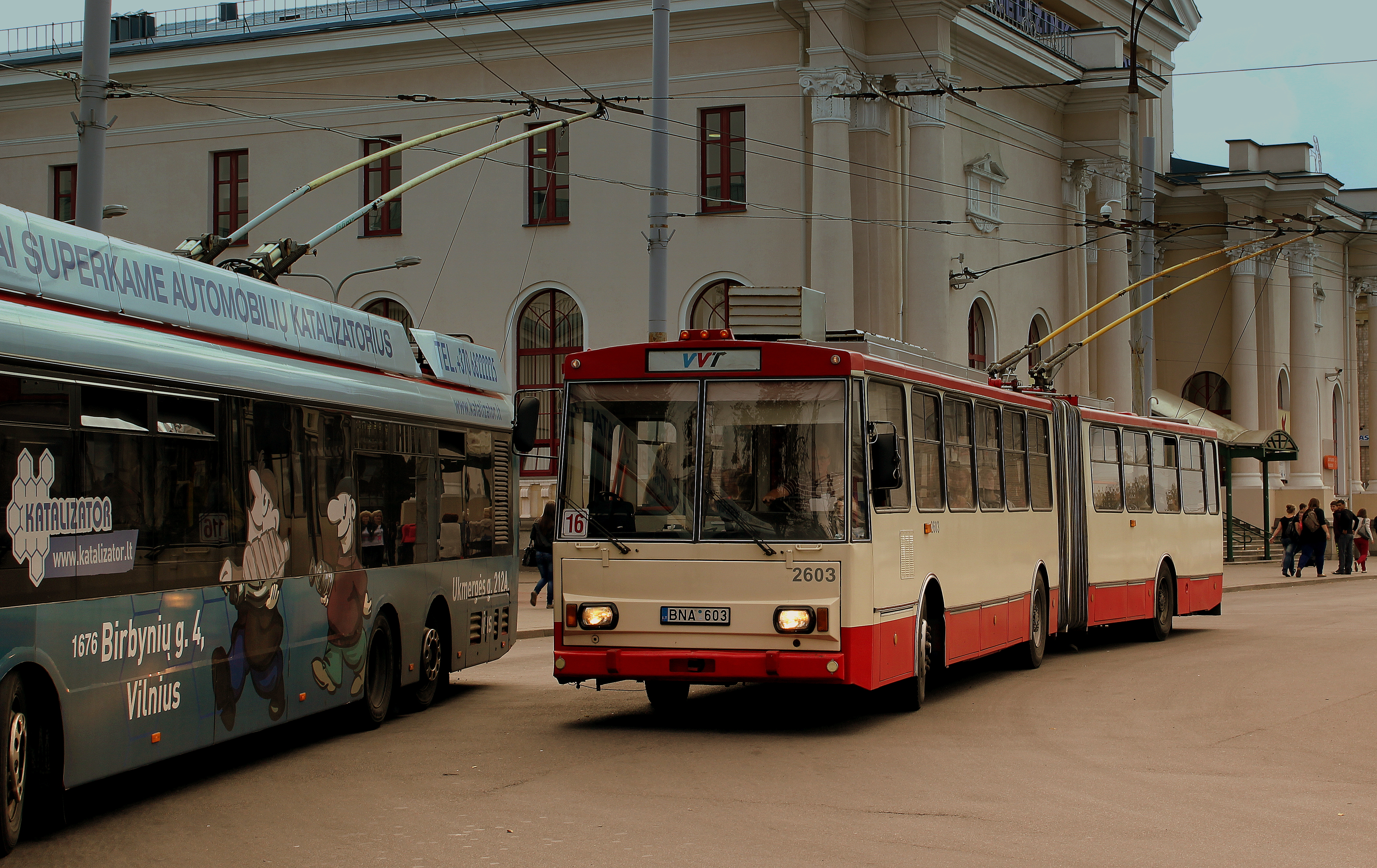 TROLLEY BUSSES AT VILLINUS STATION LITHUANIA SEP 2013